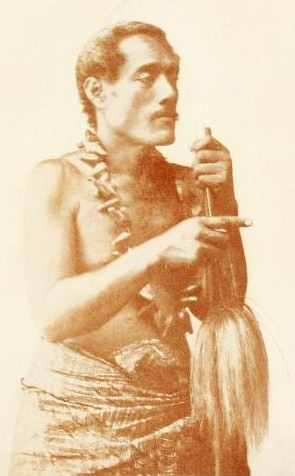 Lauaki Namulauulu Mamoe from Samoa